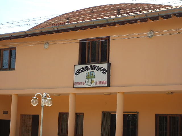 Municipalidad